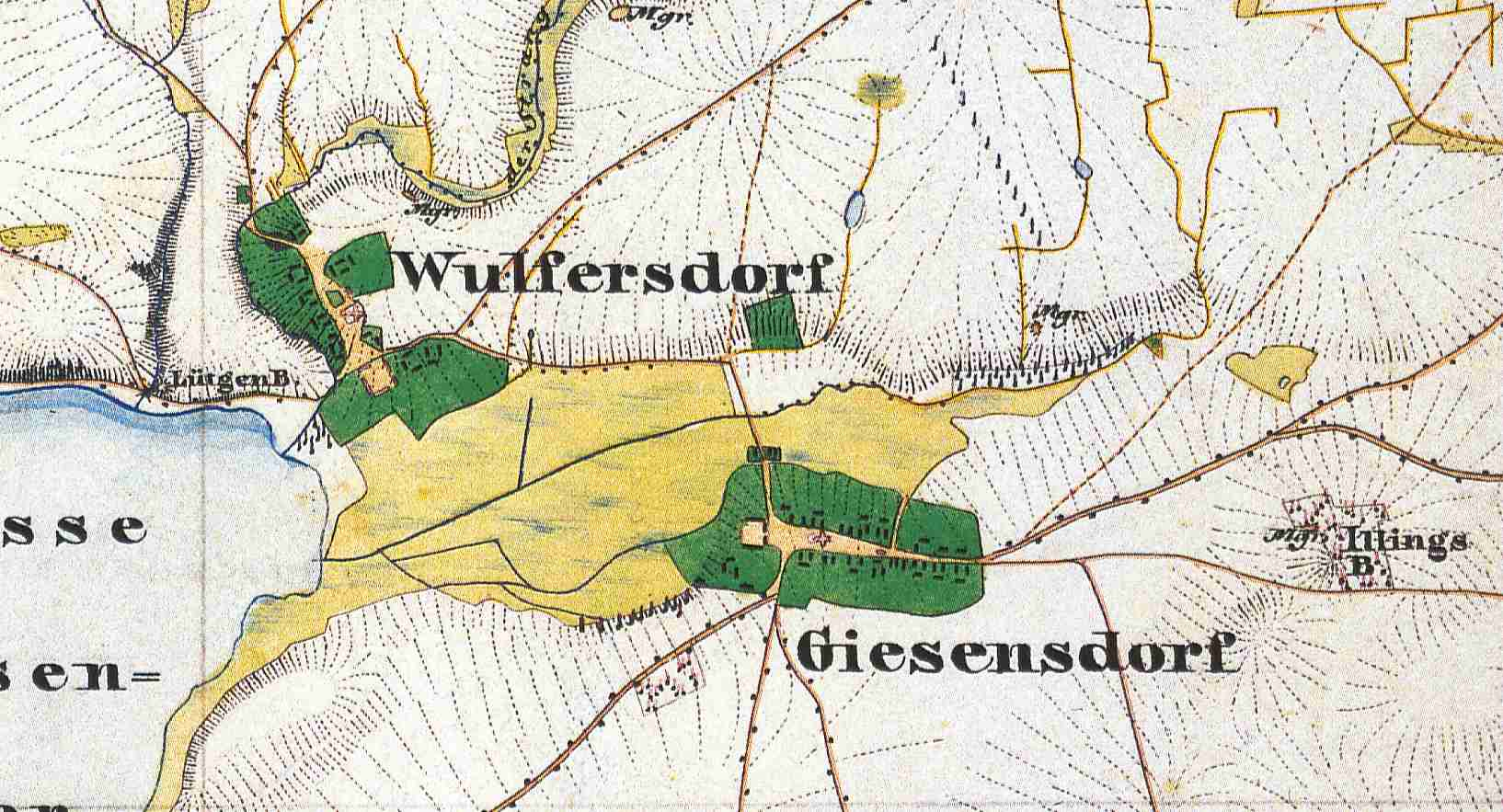 Giesensdorf mit Wohnplatz Wulfersdorf, Ortsteil der Gemeinde Tauche, Lkr. Oder-Spree, Brandenburg, Deutschland, Ausschnitt aus dem Urmesstischblatt 3850 Kossenblatt von 1846